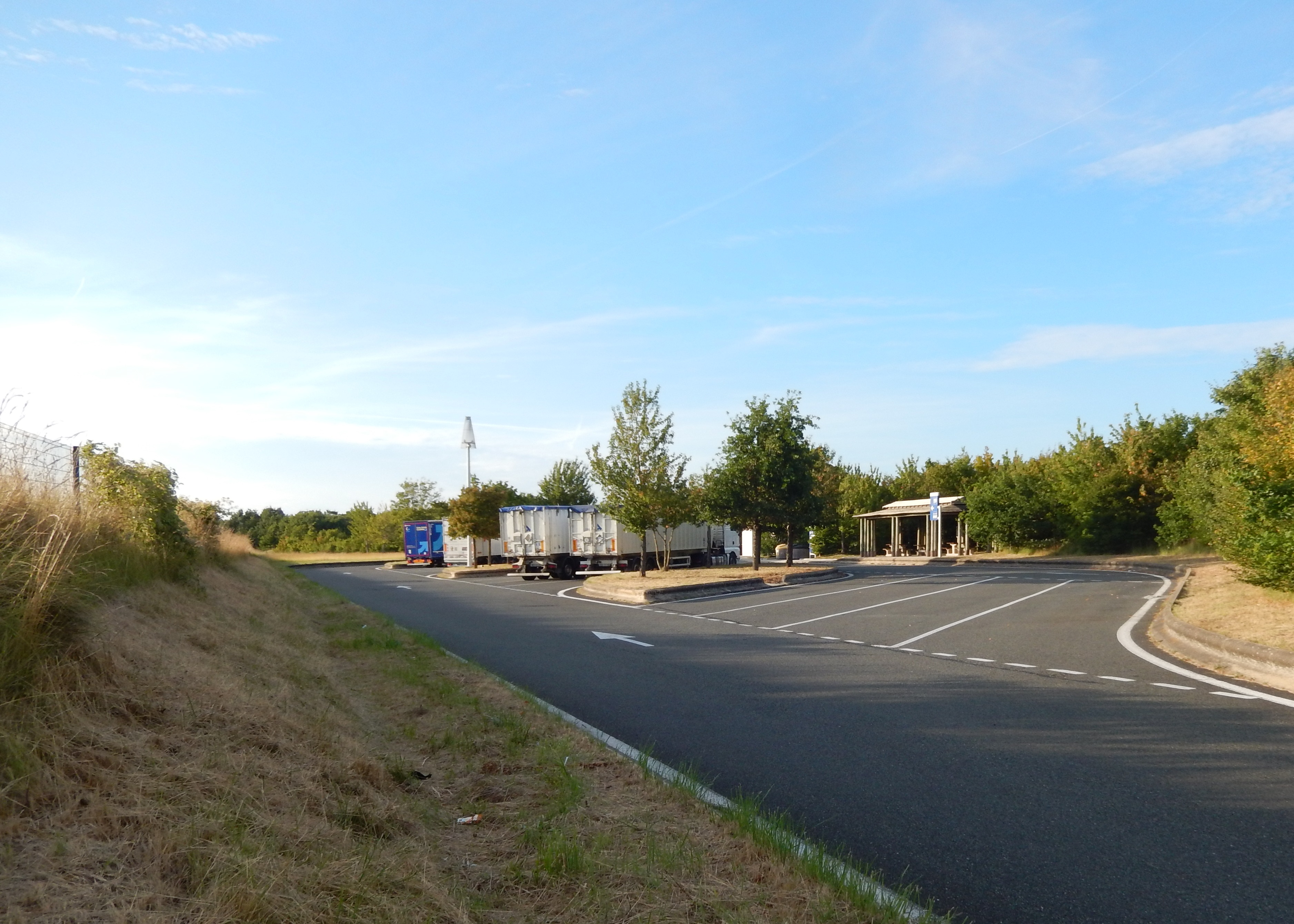 La partie dédiée au stationnement des poids lourds de l'aire autoroutière de la Pierre de Crazannes, située sur l'autoroute A837 (Autoroute des Oiseaux) dans le sens Saintes → Rochefort sur Mer, dans la commune de Plassay (Charente-Maritime, France).